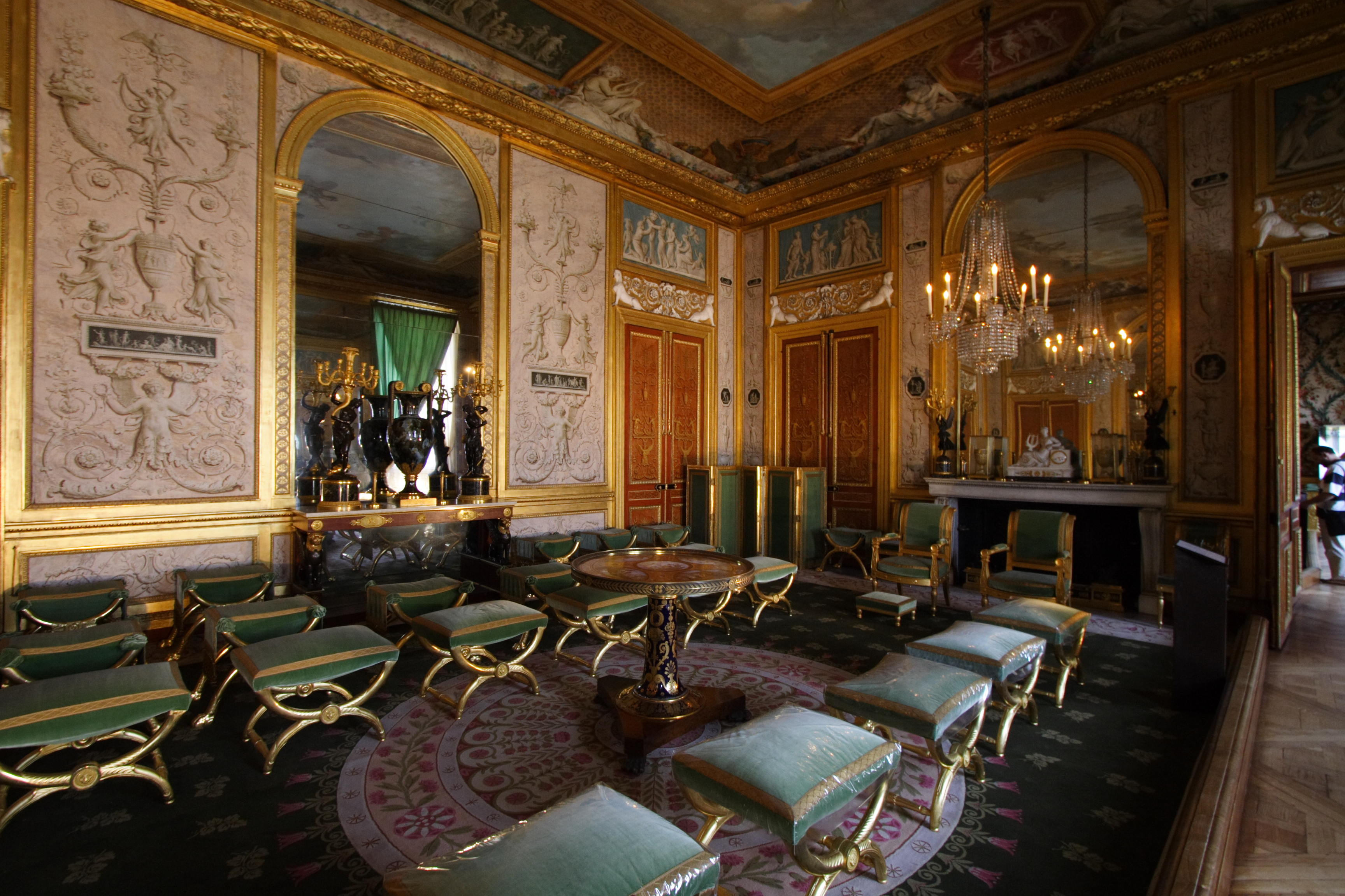 Le grand salon de l'Impératrice au château de Fontainebleau